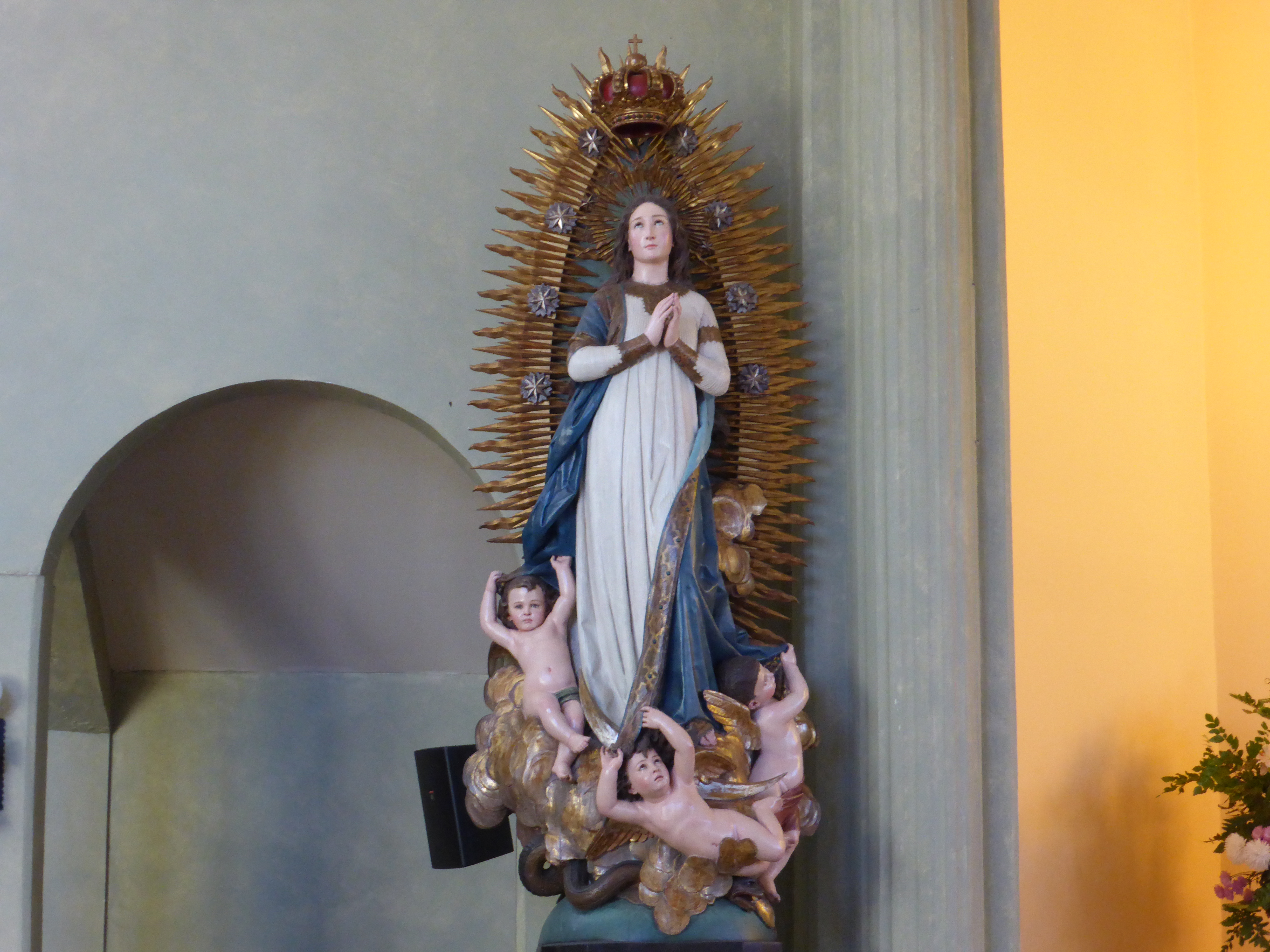 Imagen de la Inmaculada Concepción, firmada por "J. FLOTATS" (con talleres artísticos en Cataluña, España). Escultura realizada hacia los años 1900-1915. Se encuentra en el interior de la iglesia parroquial de la Inmaculada Concepción, en Talagante (Chile).